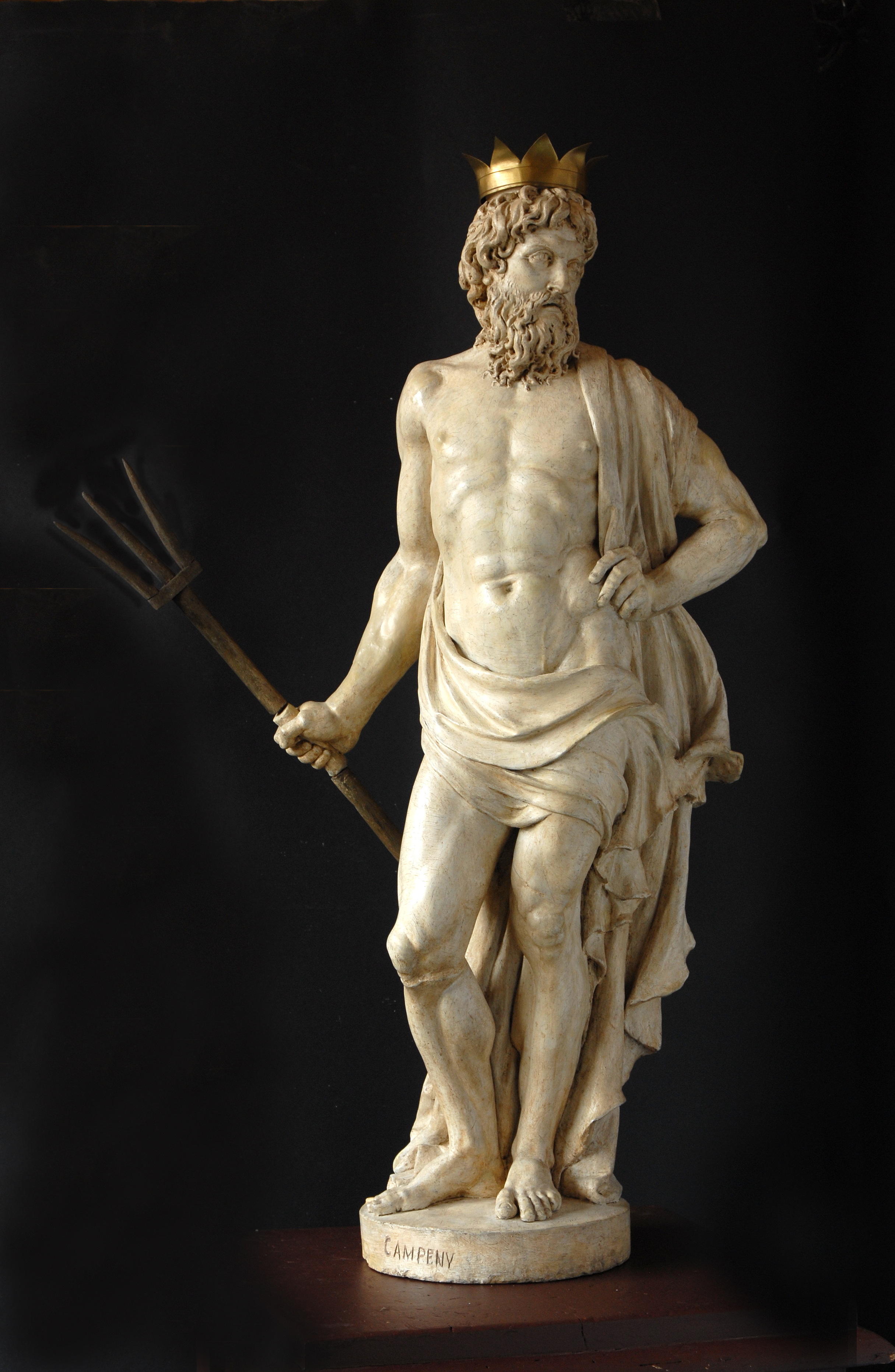 Figura de cos sencer del déu de les aigües romà, Neptú, semicobert amb un drapejat que permet veure la seva anatomia robusta. Duu una barba espessa, va cobert amb una corona metàl·lica de nou puntes i sosté un trident de fusta amb la mà dreta. El cos dibuixa un lleuger 'contraposto' clàssic, recolzant el pes sobre la cama esquerra, girant el cap a la seva esquerra, amb la cama dreta semiflexionada i la mà esquerra recolzada a la cintura. La figura reposa sobre una base circular, també de guix. El trident és de fusta i la corona de nou puntes de metall.